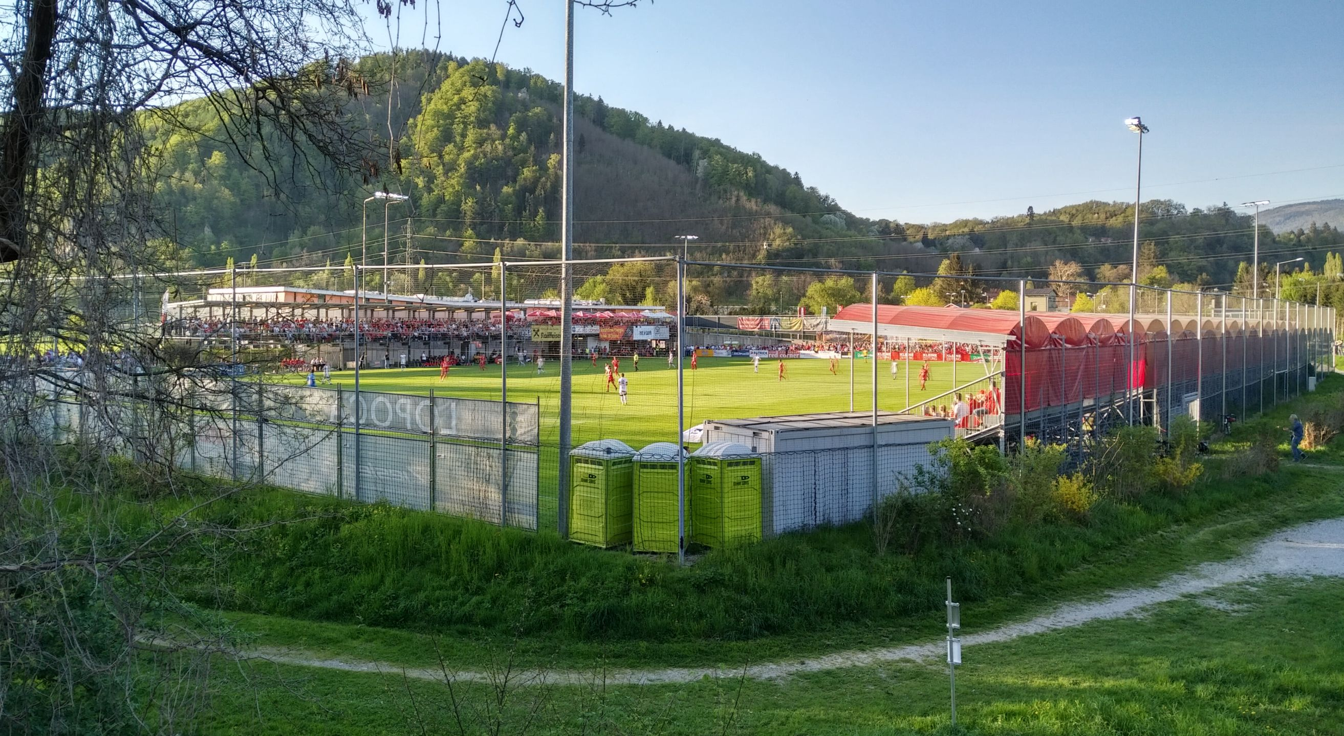 Sportzentrum Weinzödl Gesamtansacht